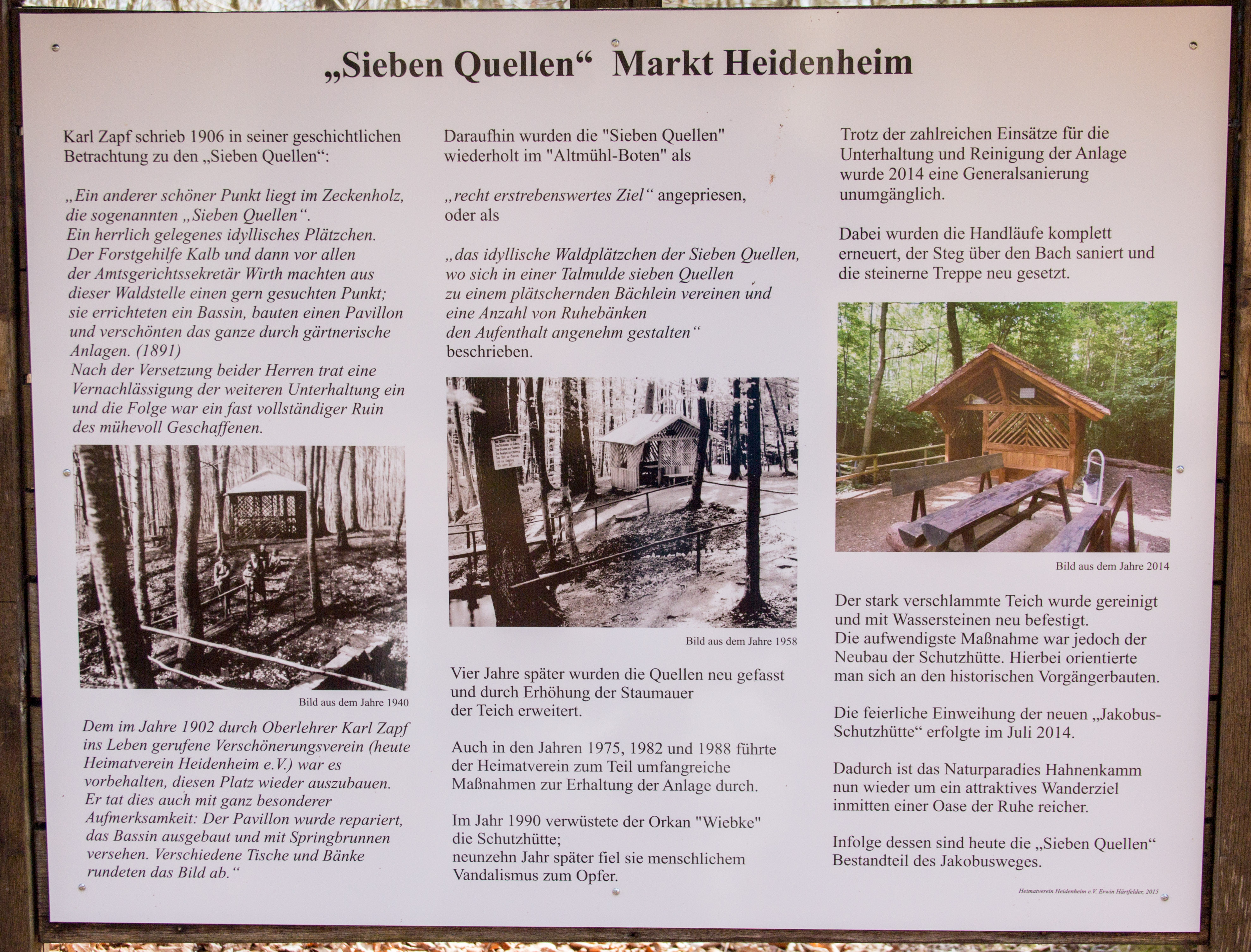 Sieben Quellen, Karstquelle, Geotop, Heidenheim